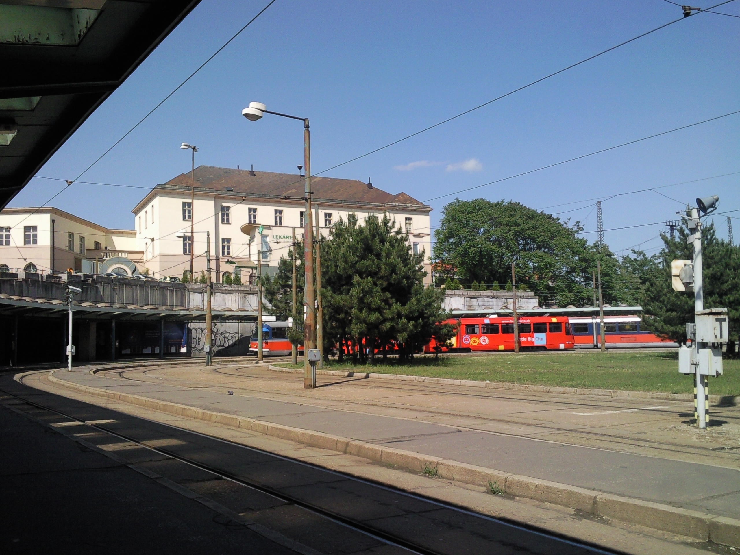 Električky na Hlavnej stanici, Bratislava